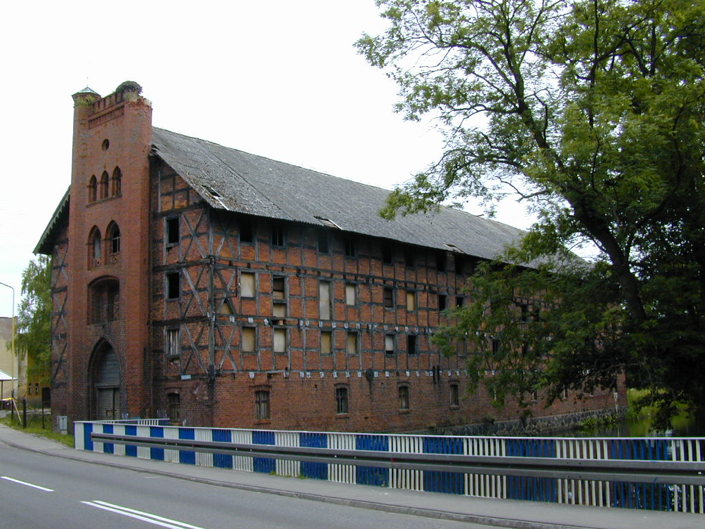 Karlino; spichlerz na ul. Szczecińskiej; autor zdjęcia Kluka; 11.06.200r.